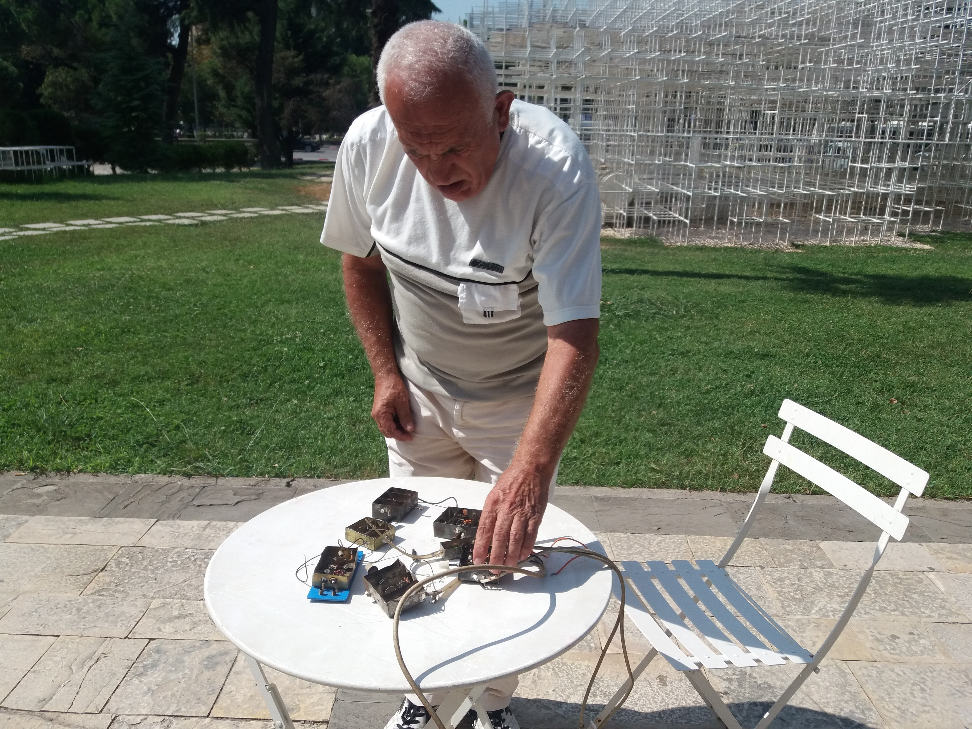 Saimir Maloku duke treguar shpikjen e tij "kanoçen"